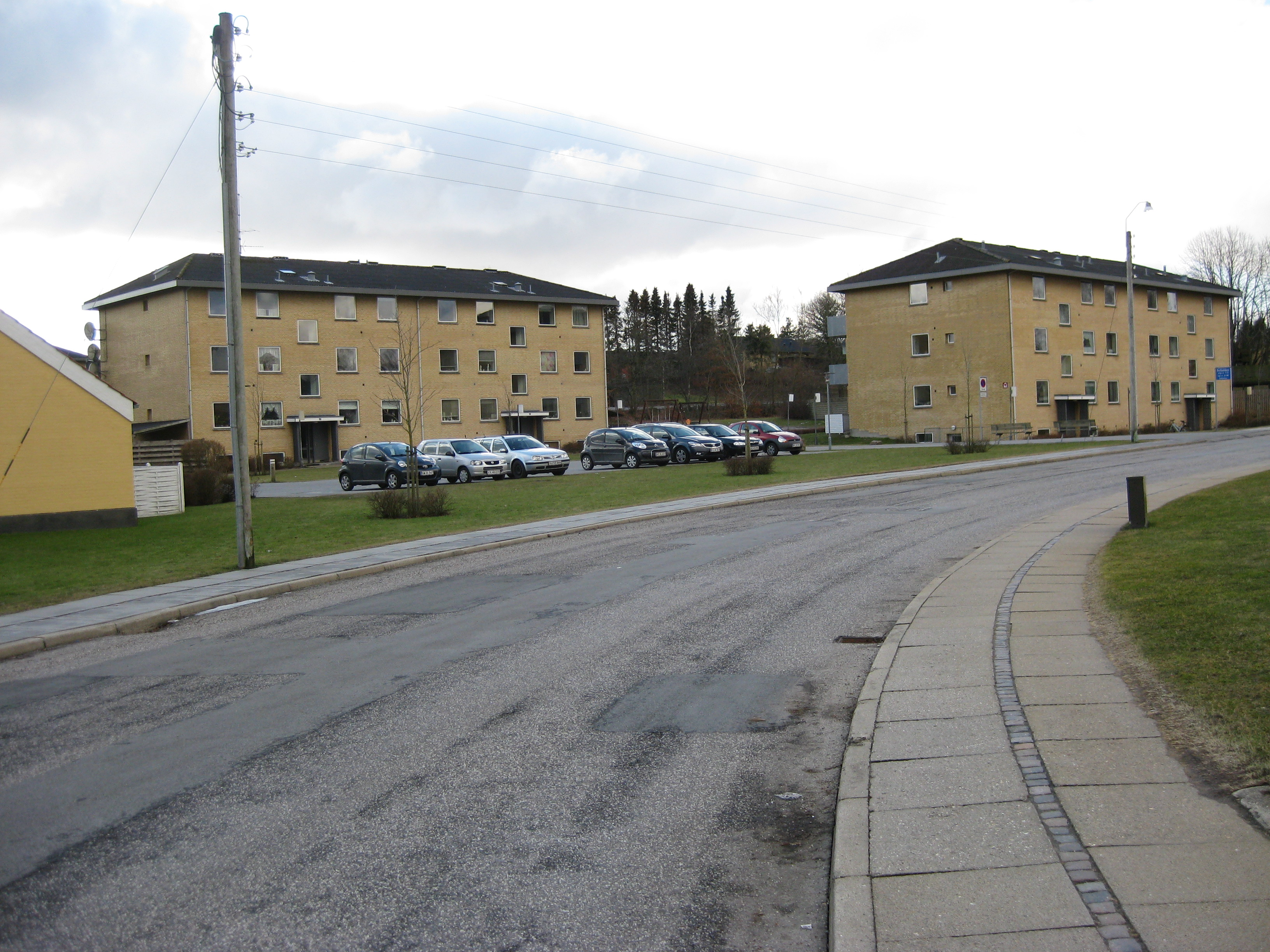 De gule boligblokke i den sydlige del af bydelen Hadsund Huse i Hadsund, bedre kendt som Solbakken.